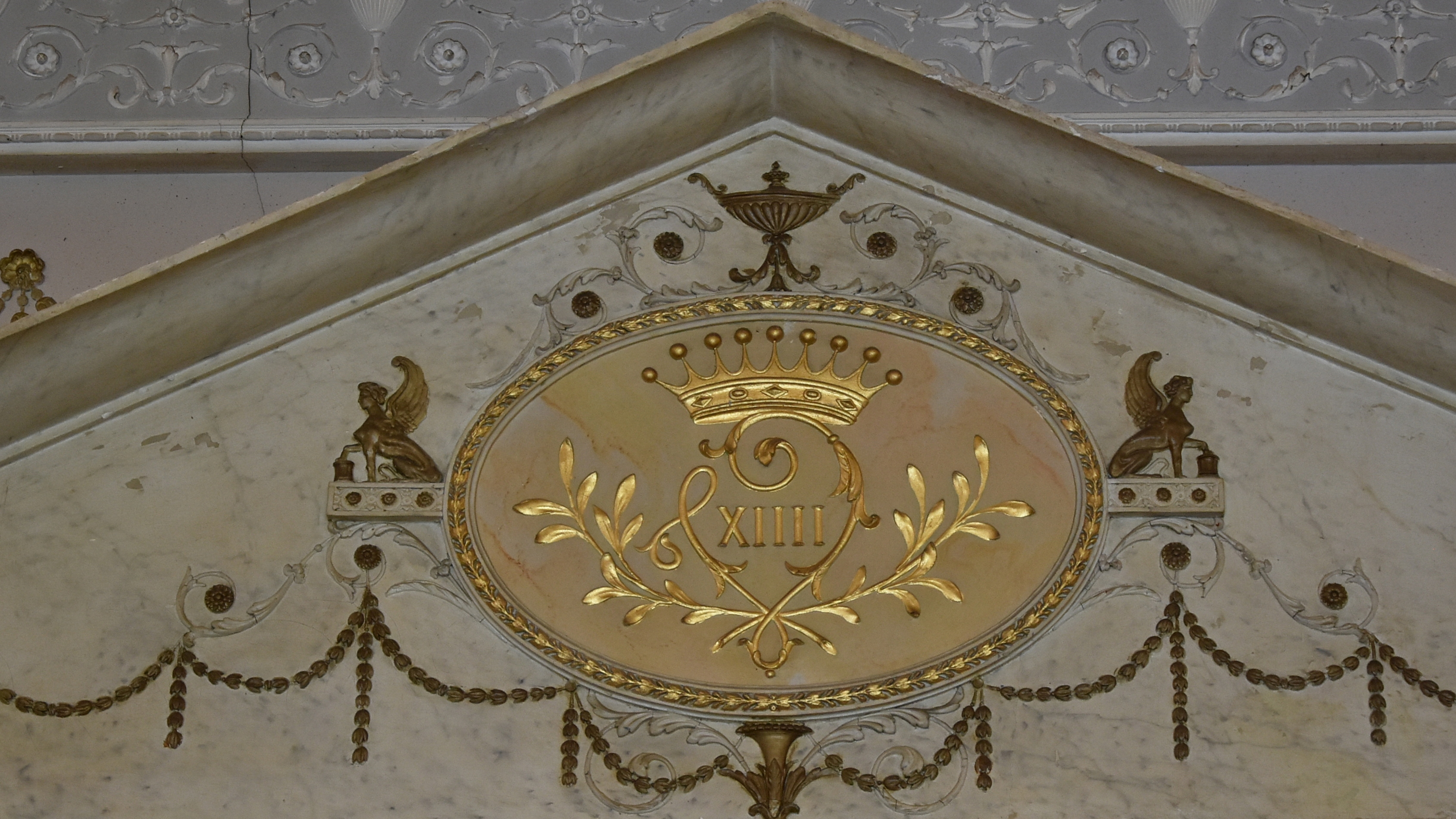 Vestibule - Kasteel Wissekerke 21-08-2018 This photo of immovable heritage has been taken in the Flemish Region